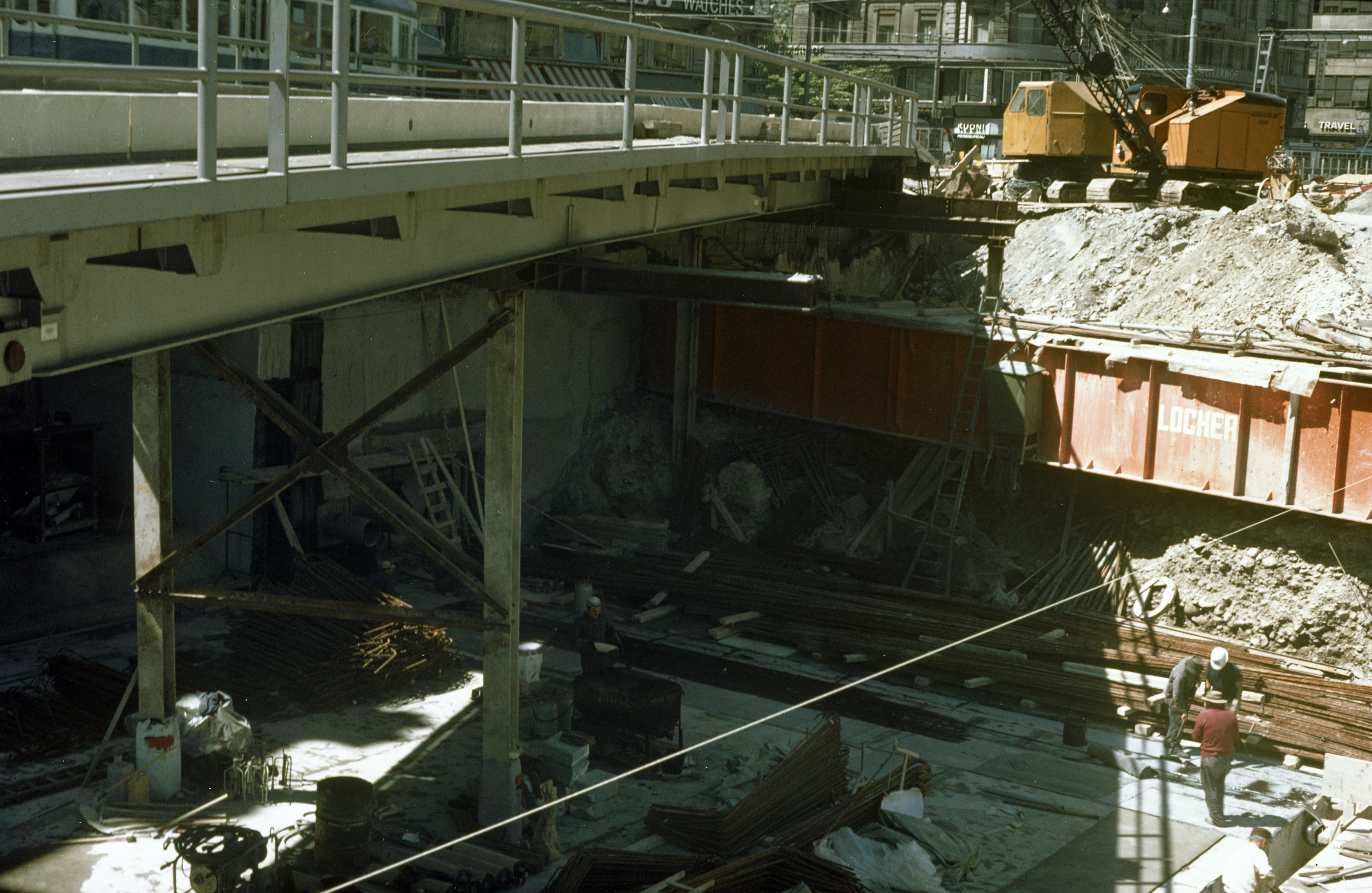 Zürich Hauptbahnhof, Baustelle Shopville